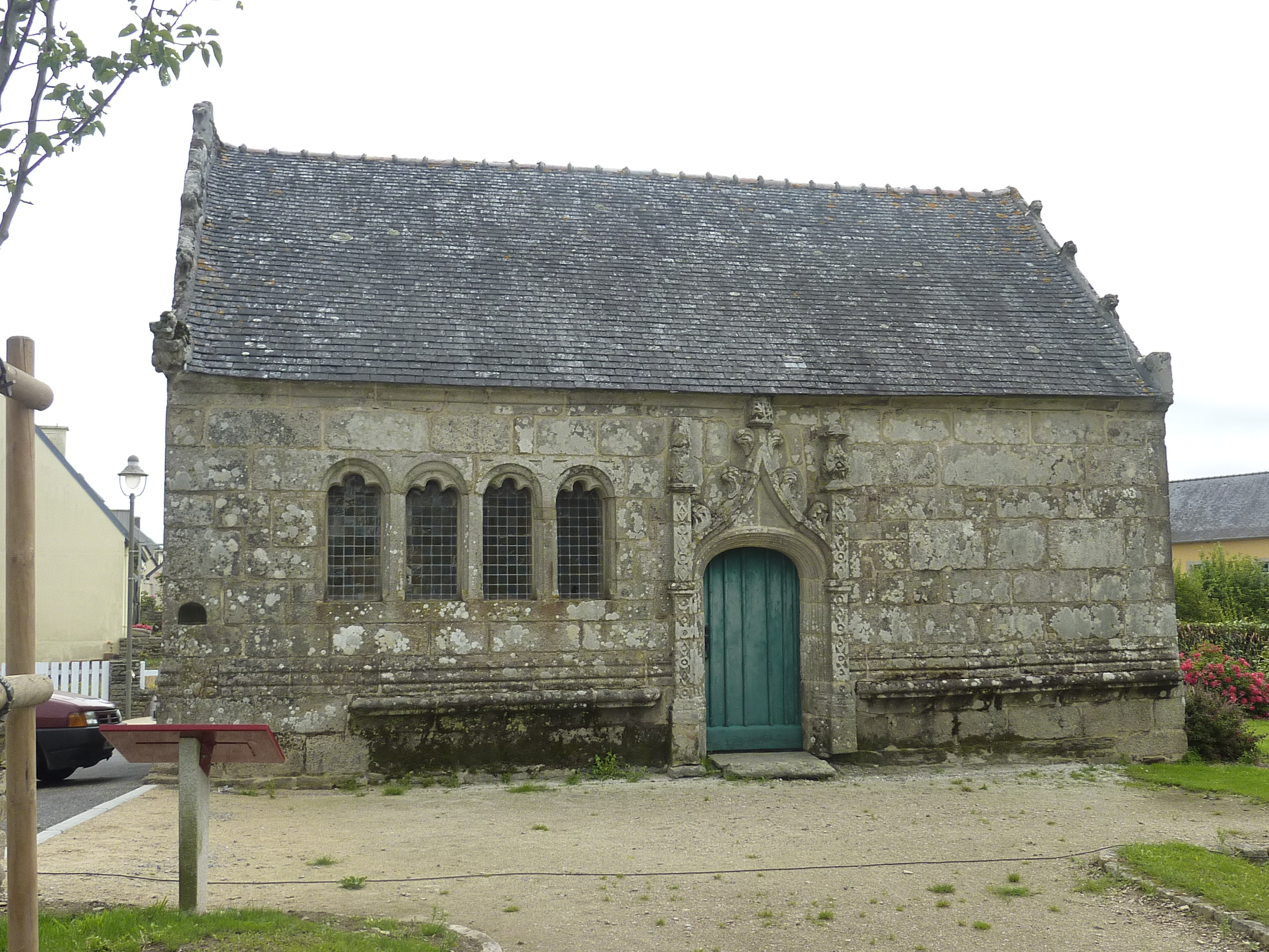 Cléden-Poher : l'Ossuaire (XVIe siècle), styles gothique et Renaissance .